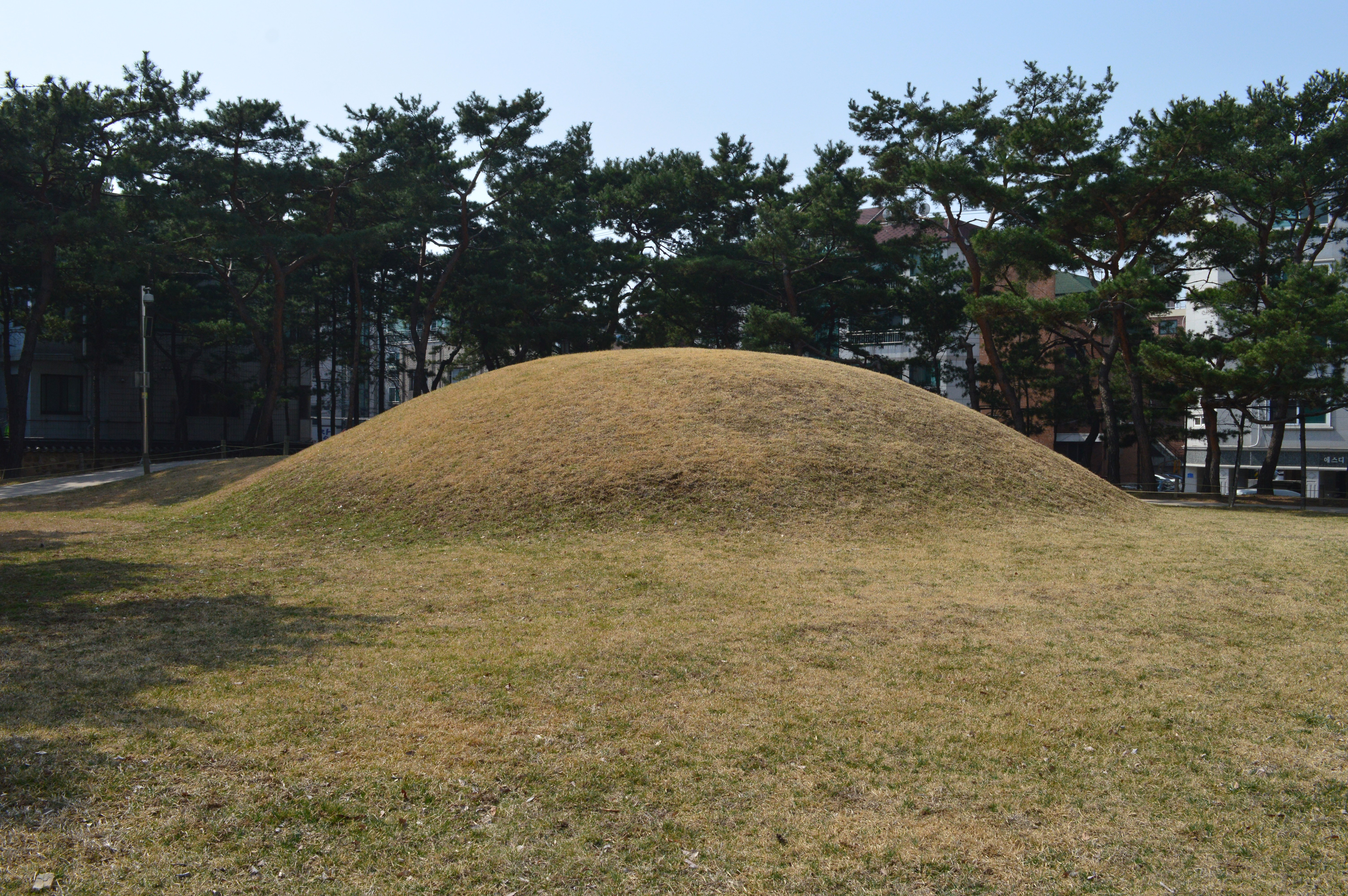 石村洞5号墳